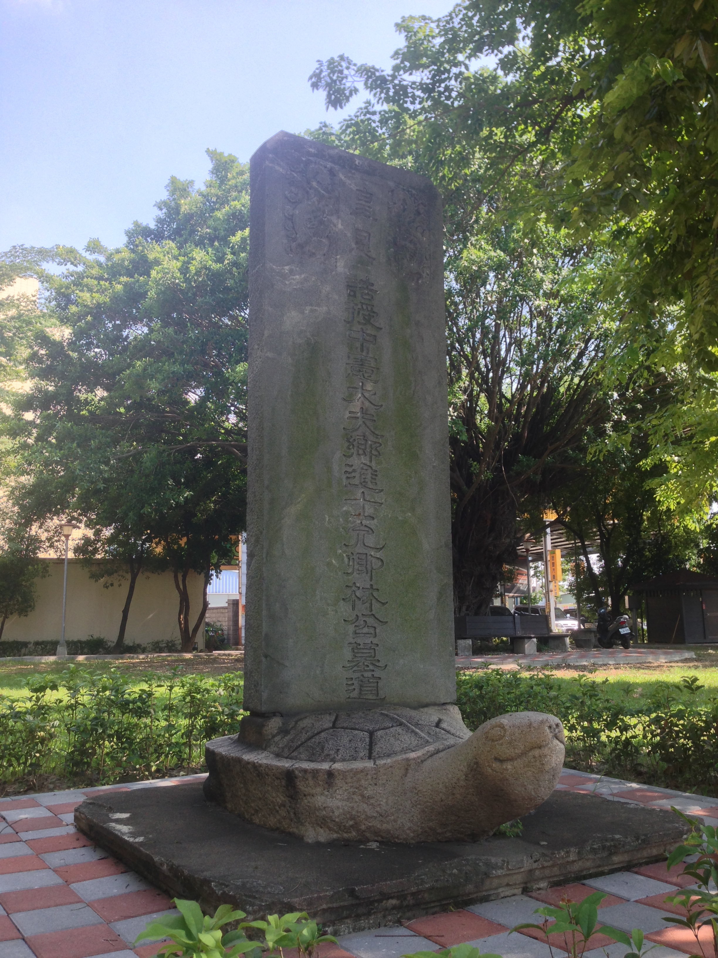 中文（台灣）: 林允卿墓道碑